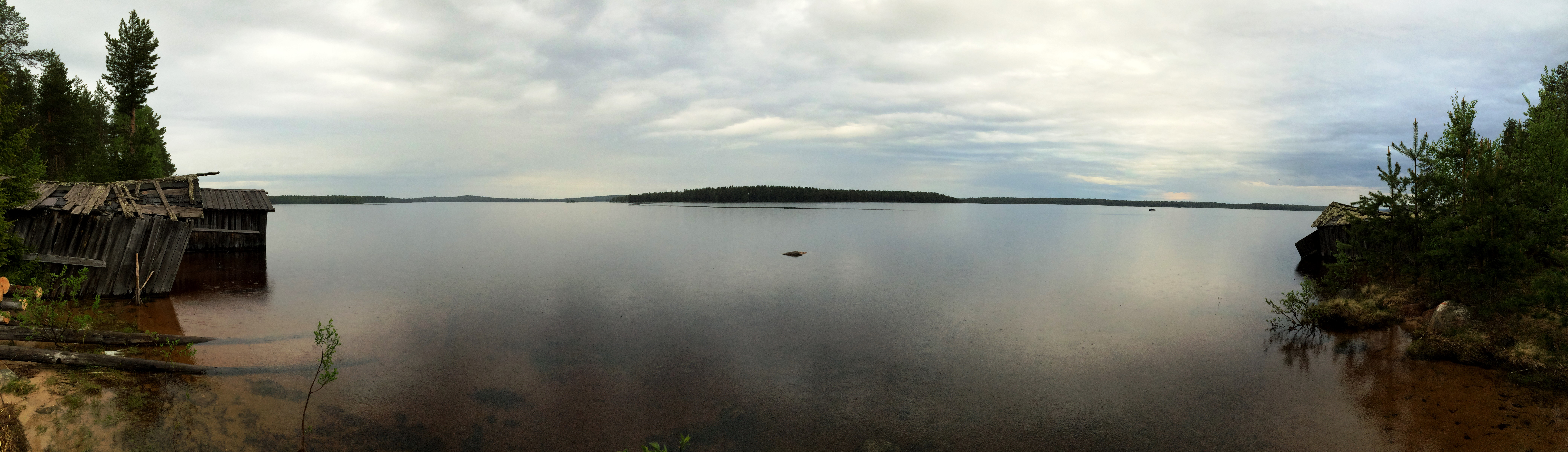 Каргиозеро